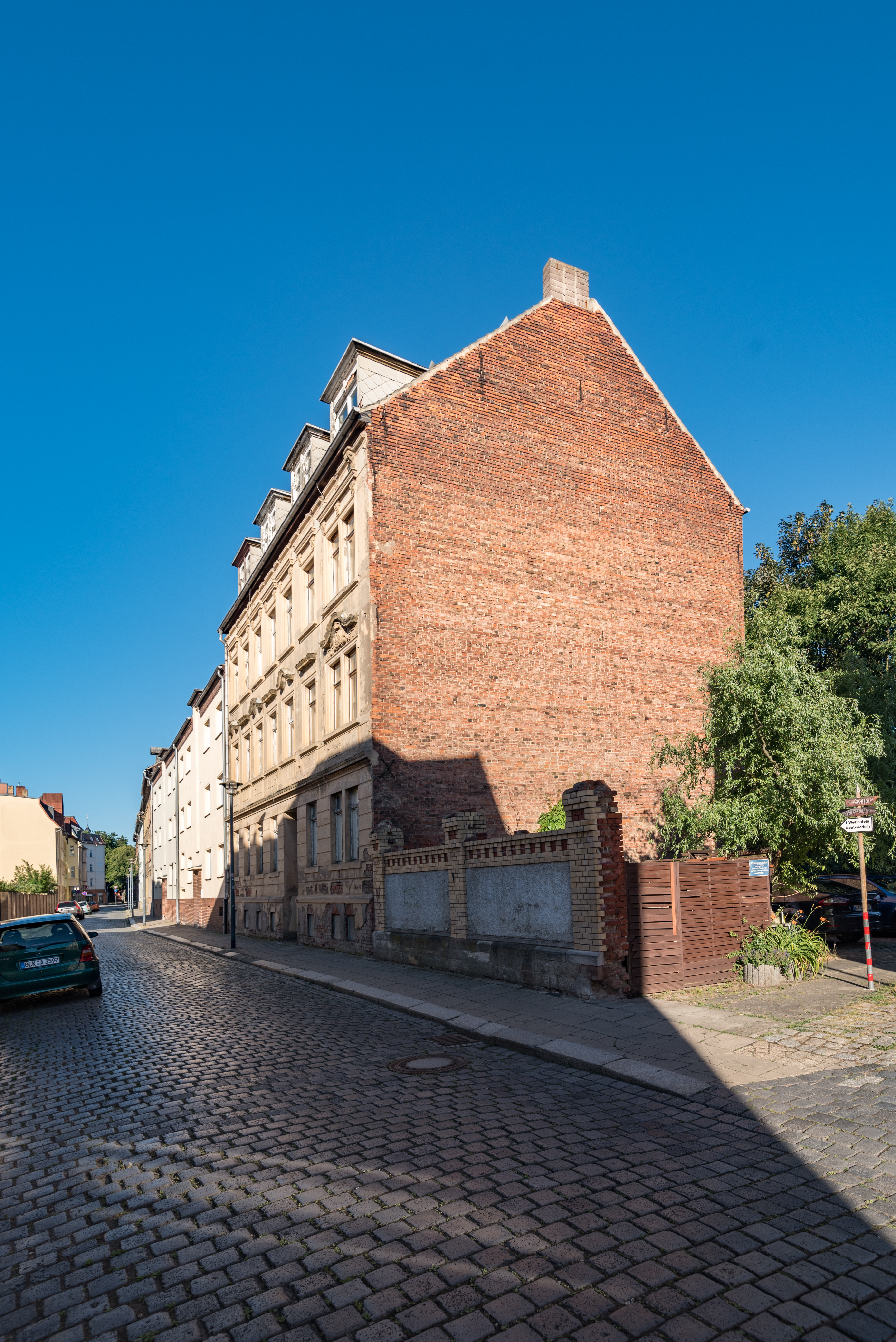 Weißenfels, Rudolf-Götze-Straße 20